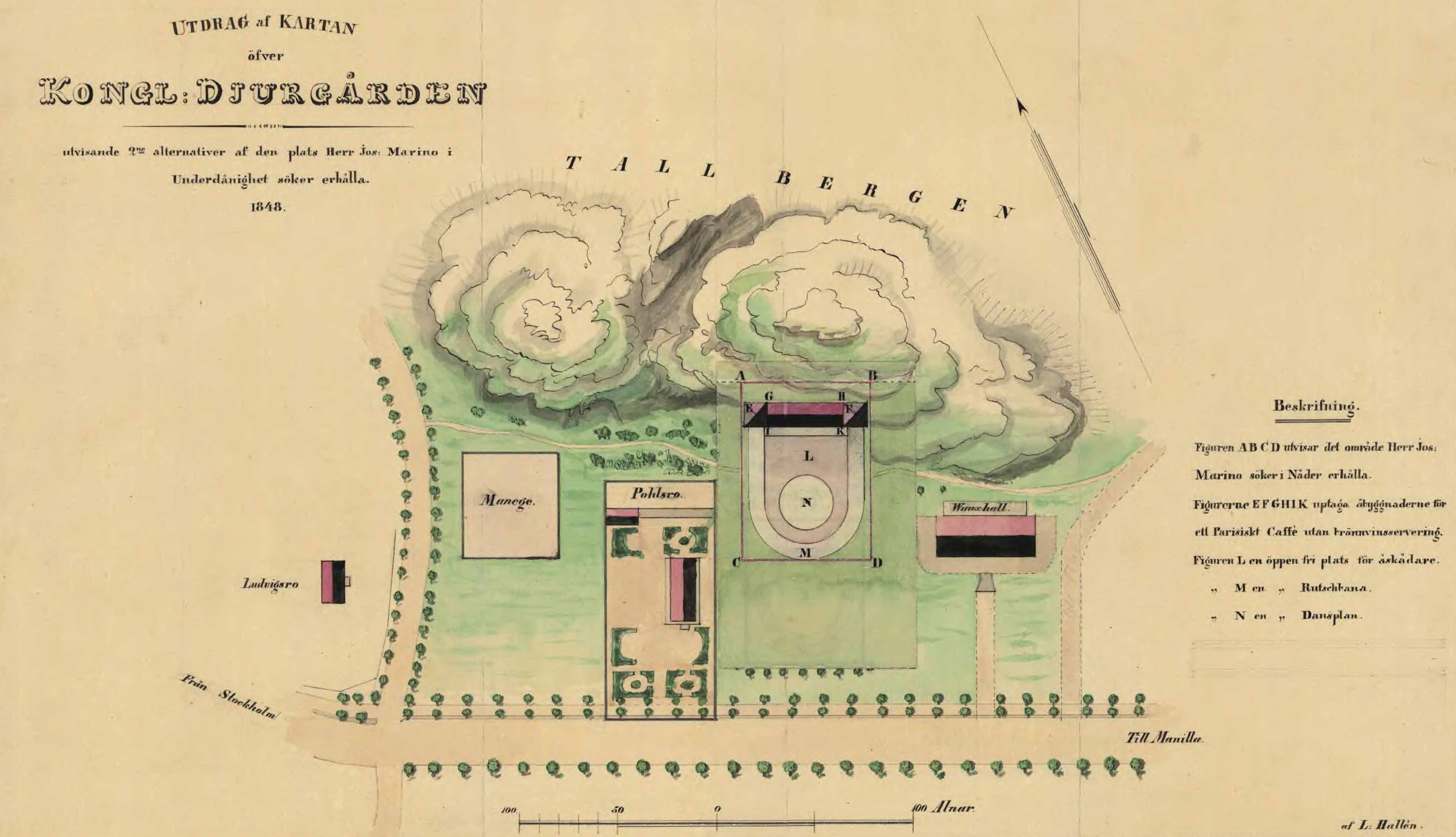 Pohlsro på Kungl. Djurgården med omgivning